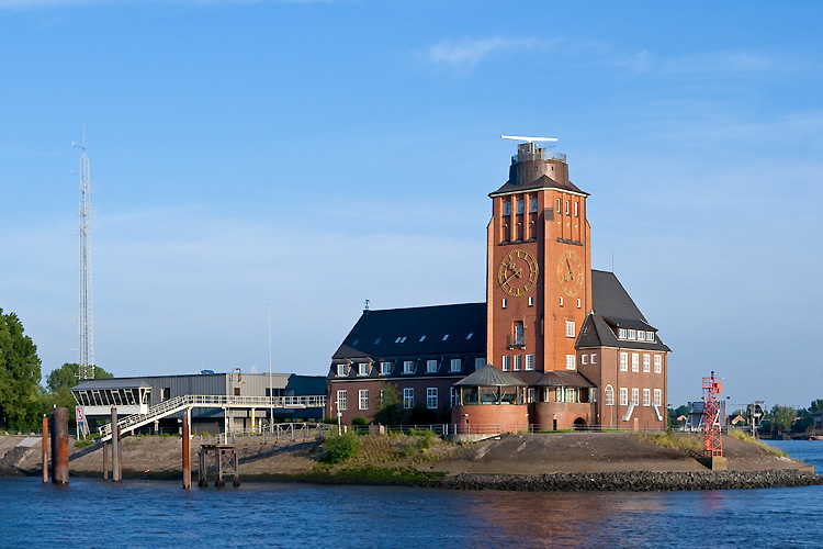 Das Lotsenhaus Seemannshöft auf der gleichnamigen Landzunge in Hamburg-Waltershof ist ein 1913–14 errichteter Klinkerbau mit 24 m hohem Signal- und Beobachtungsturm des Architekten Fritz Schumacher. In den 1970er-Jahren wurde östlich des Gebäudes eine Erweiterung gebaut. In der Lotsenstation sind neben den Hafenlotsen der Schiffsmeldedienst und die nautische Zentrale untergebracht. Vor dem Lotsenhaus an der äußersten Spitze der Landzunge steht das Leuchtfeuer Seemannshöft als Einfahrtsfeuer für den Köhlfleet.